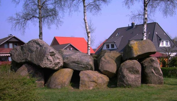 Steingrab in Osterholz-Scharmbeck. Photographiert im April 2005.